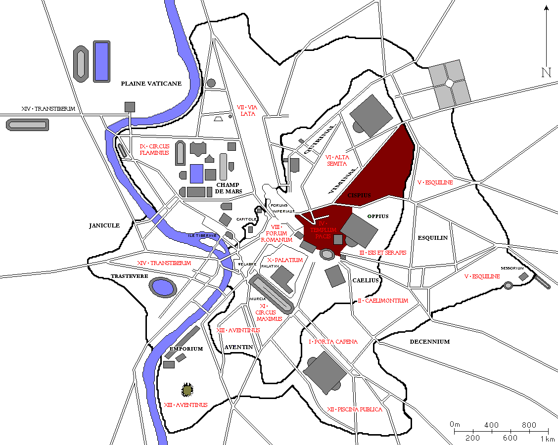 Plan de Rome avec la quatrième région des 14 régions d'Auguste